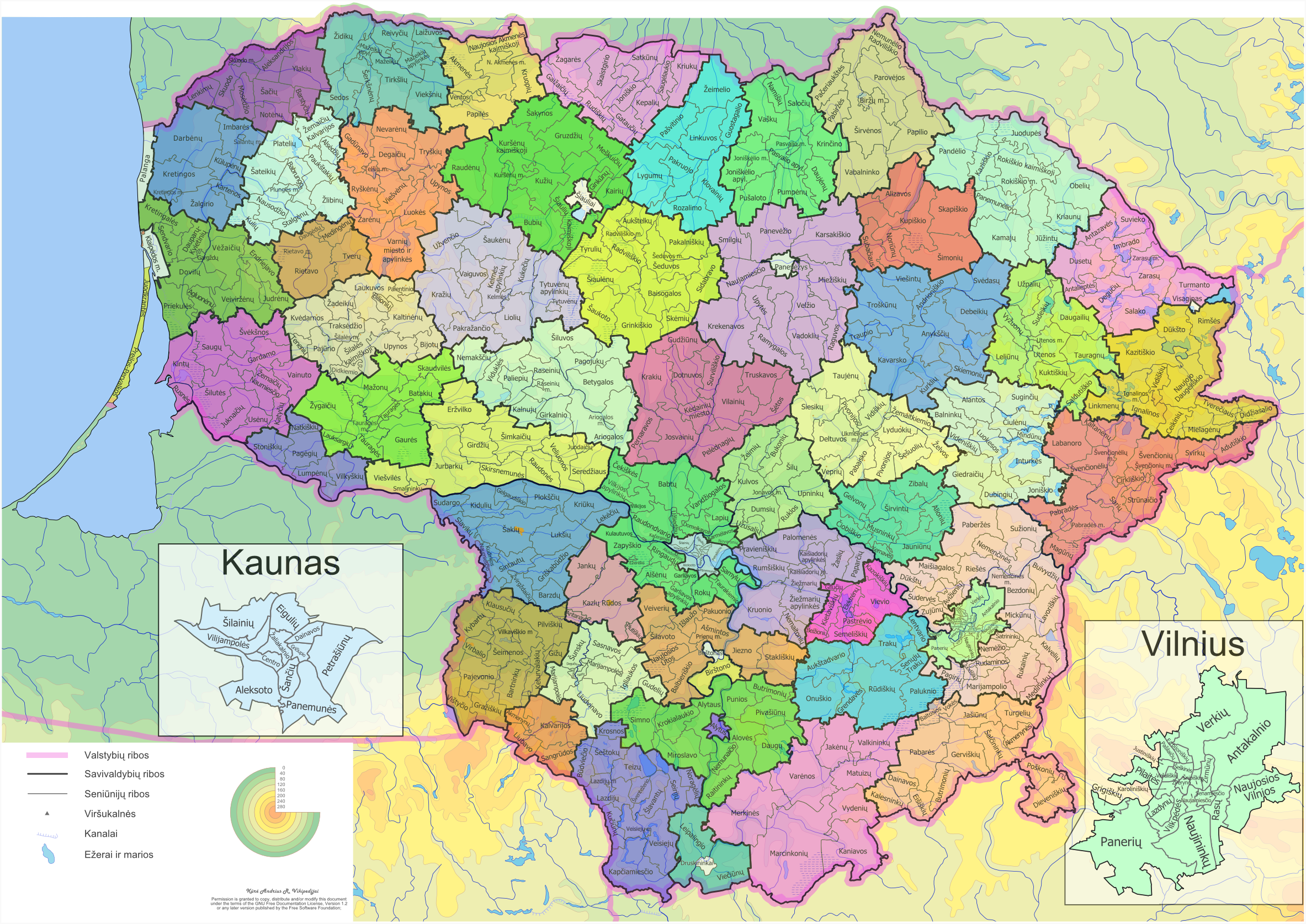 Lietuvos seniūnijos. Šaltiniai - :Image:LithuaniaPhysicalMap-Detailed.svg, įvairūs neskaitmenizuoti žemėlapiai.